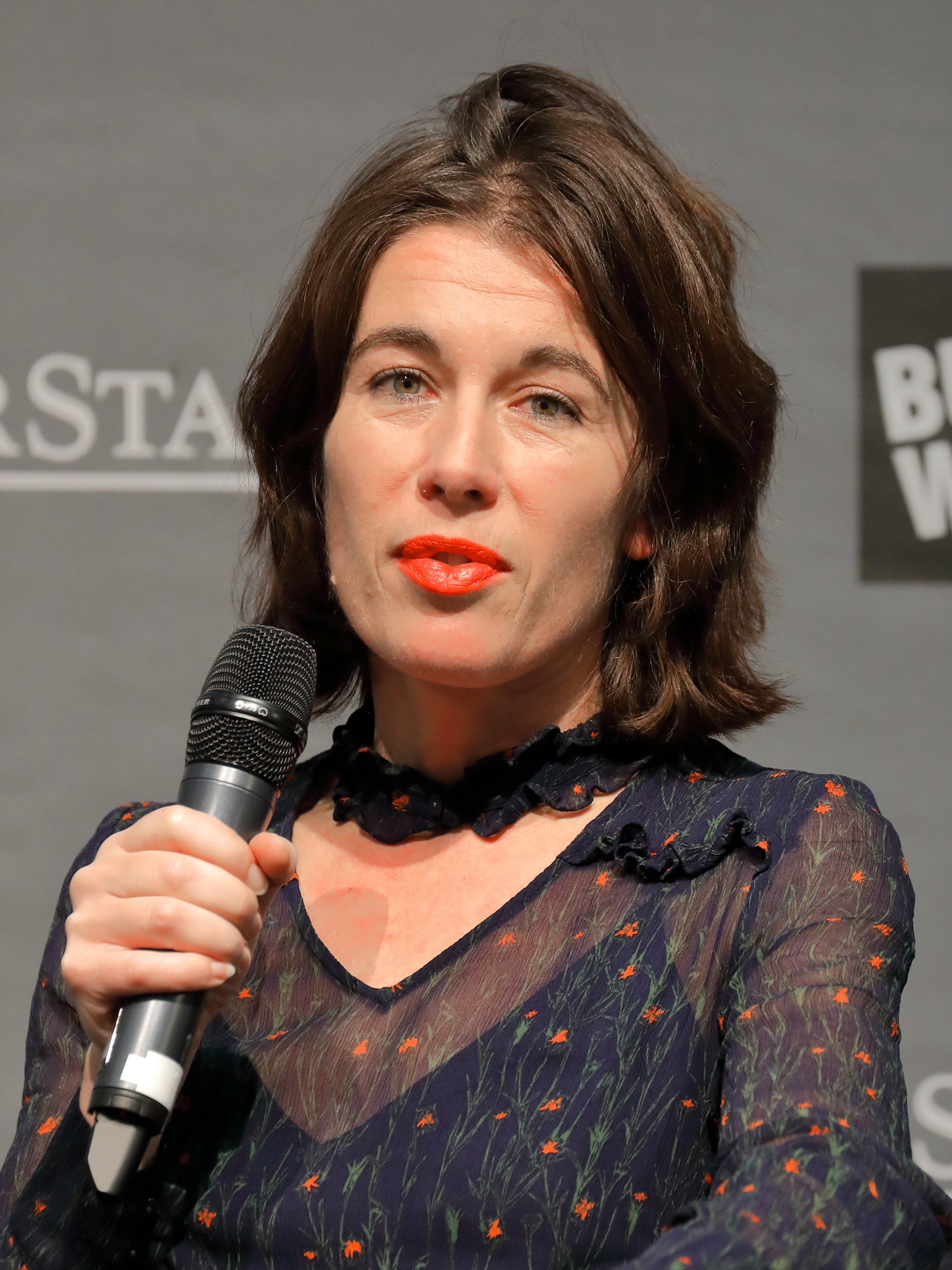 Die eine österreichische Biologin und Schriftstellerin Andrea Grill auf der Wiener Buchmesse 2019.